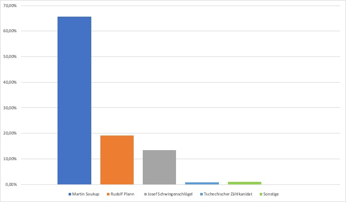 Reichsratswahl 1911 Wahlbezirk Böhmen 126 Diagramm